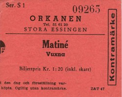 Biobiljett från 1960-talet